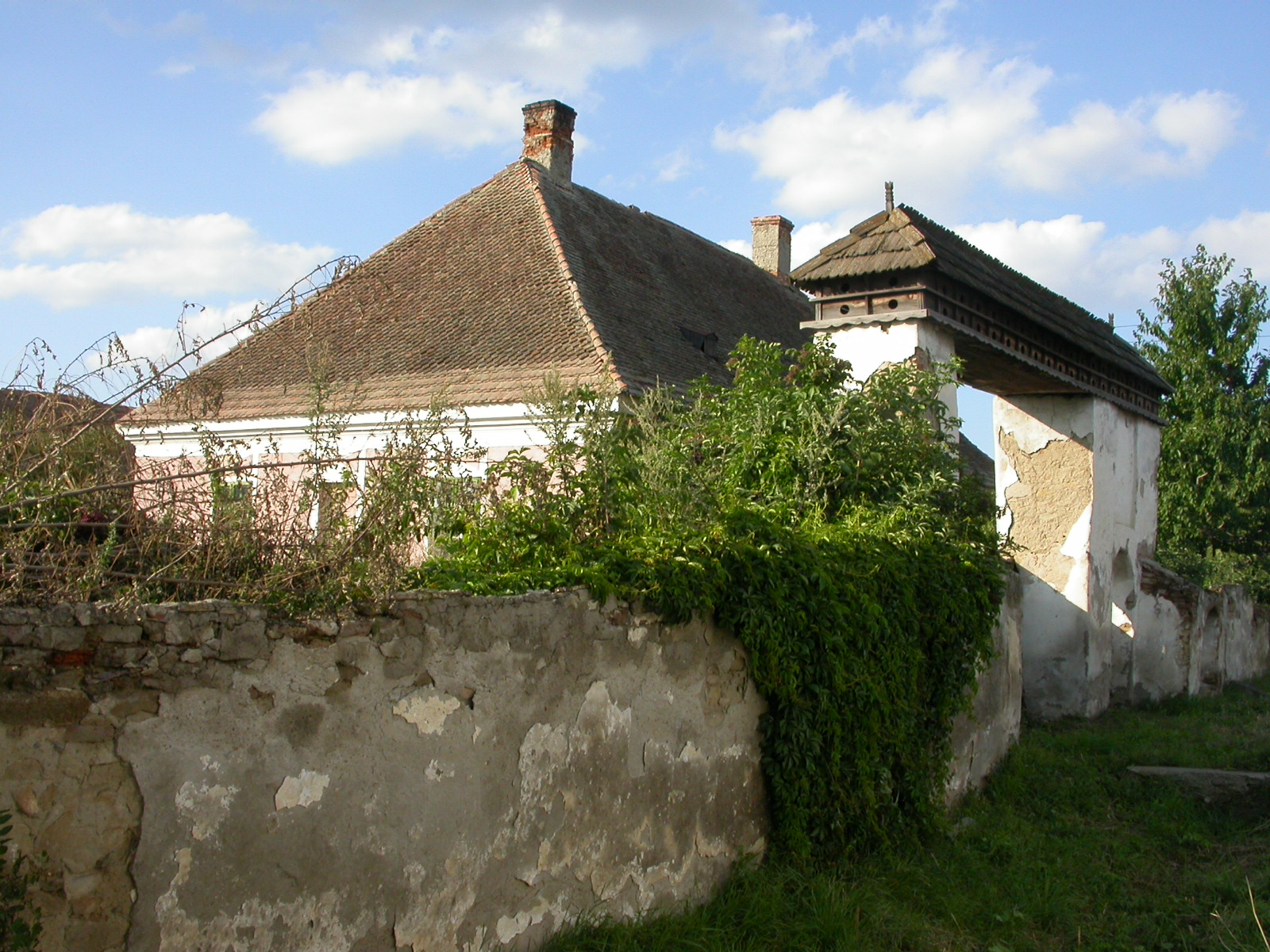 Ansamblul conacului Molnár Sándor, sec. XVIII